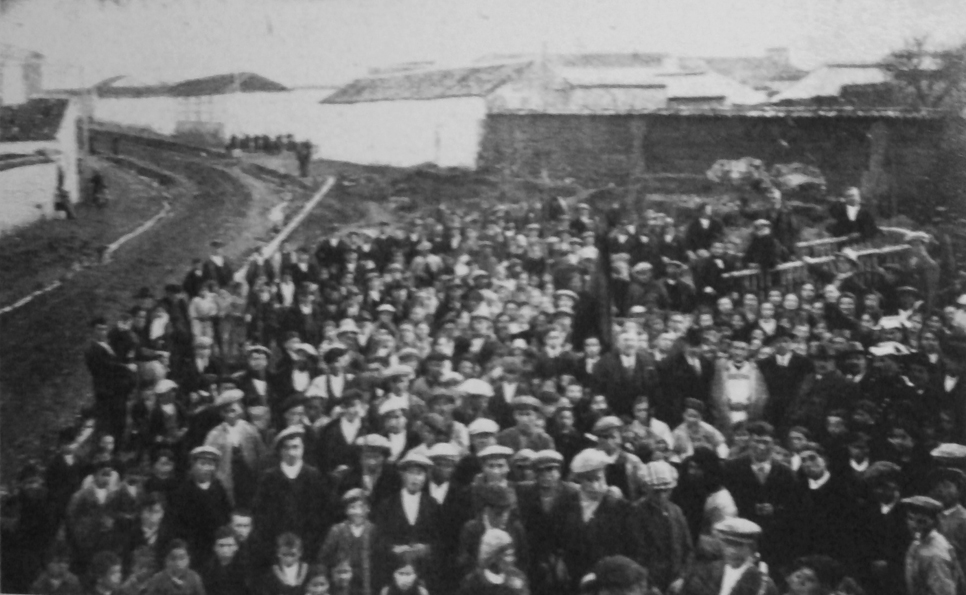 Vecinos de Guadamur (Toledo) festejan el Día del Árbol de 1923 en la Plaza Rectoral de la villa.